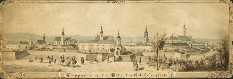 Florián Maschek: Pohled na Opavu směrem k Ratibořské bráně, který vznikl podle starší předlohy z 2. poloviny 18. století. 1885, 24 × 71 cm, papír, lisování, akvarel.